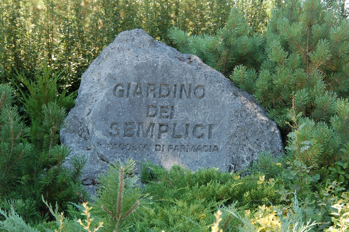 Chieti 2011